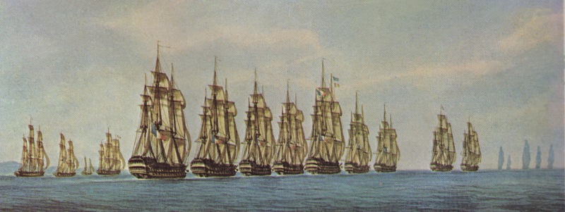 Vue d'une escadre, par François Roux (1805-1870) peintre de marine